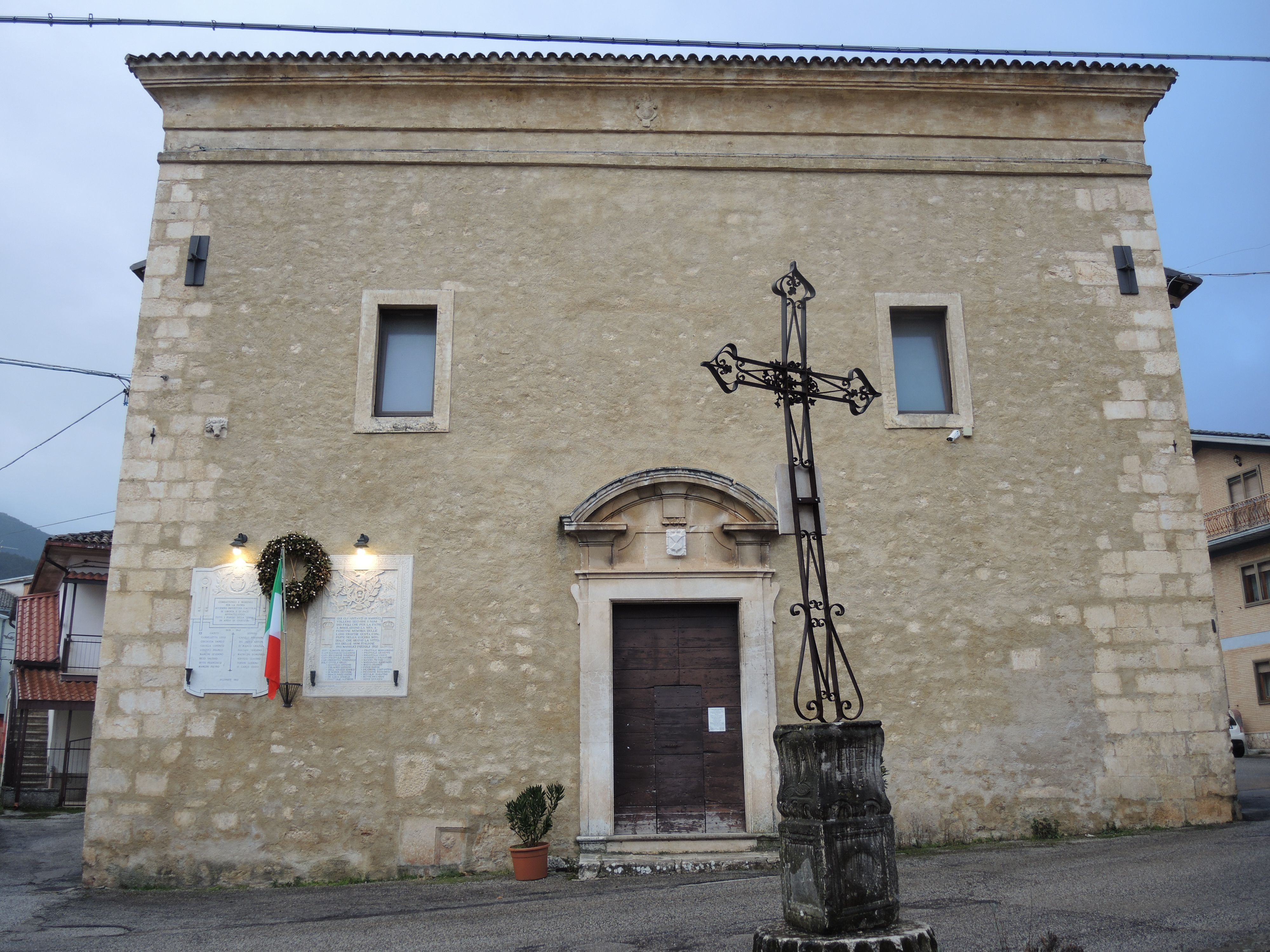 Pizzoli (AQ): Abbazia di Sant'Equizio - Parrocchia di San Lorenzo a Marruci